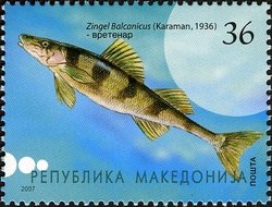 Zingel balcanicus